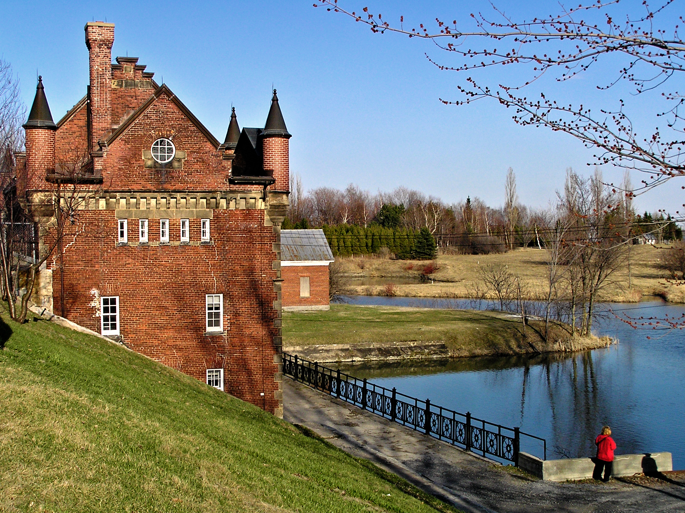 Les Cèdres (Québec) - Le petit pouvoir